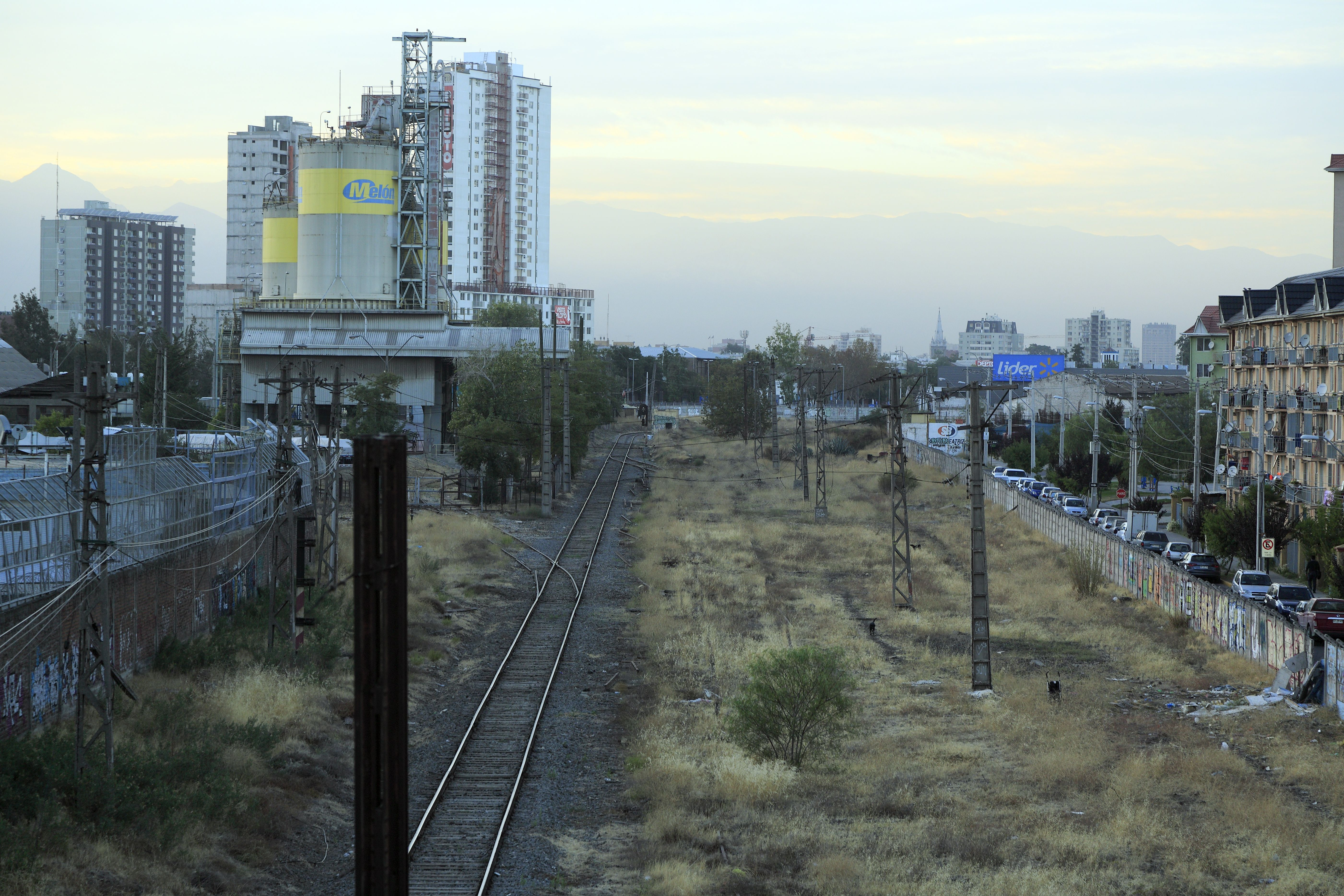 Von der Brücke der Avenida Carrascal Richtung Südosten, vom Bahnhof ist nur noch das durchgehende Hauptgleis übriggeblieben. Die Quertragwerke der Fahrleitung sind noch vorhanden, das Kettenwerk selber nicht